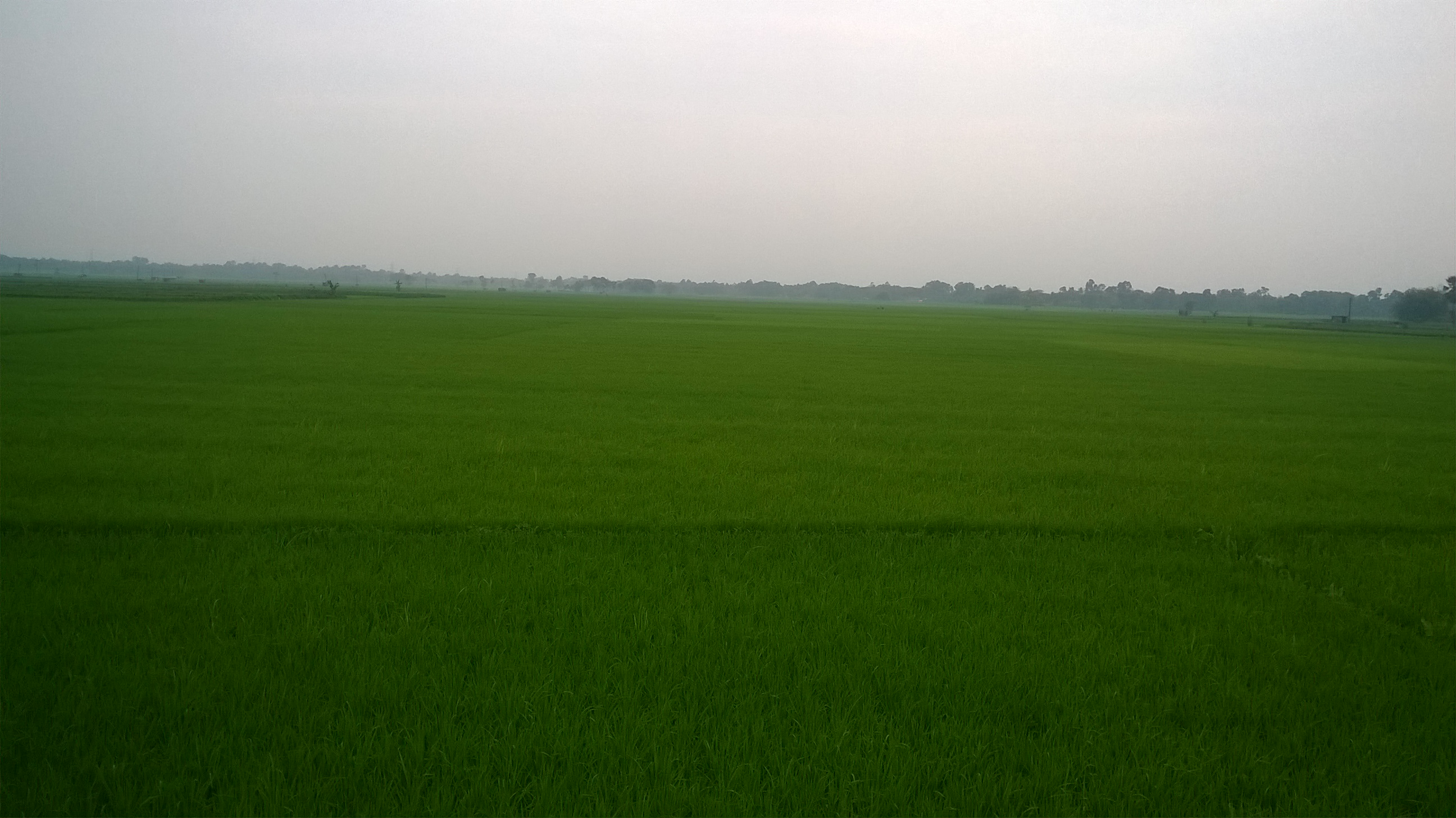 ধান ভরা মাঠ, বনগাঁর দীঘারি গ্রামে